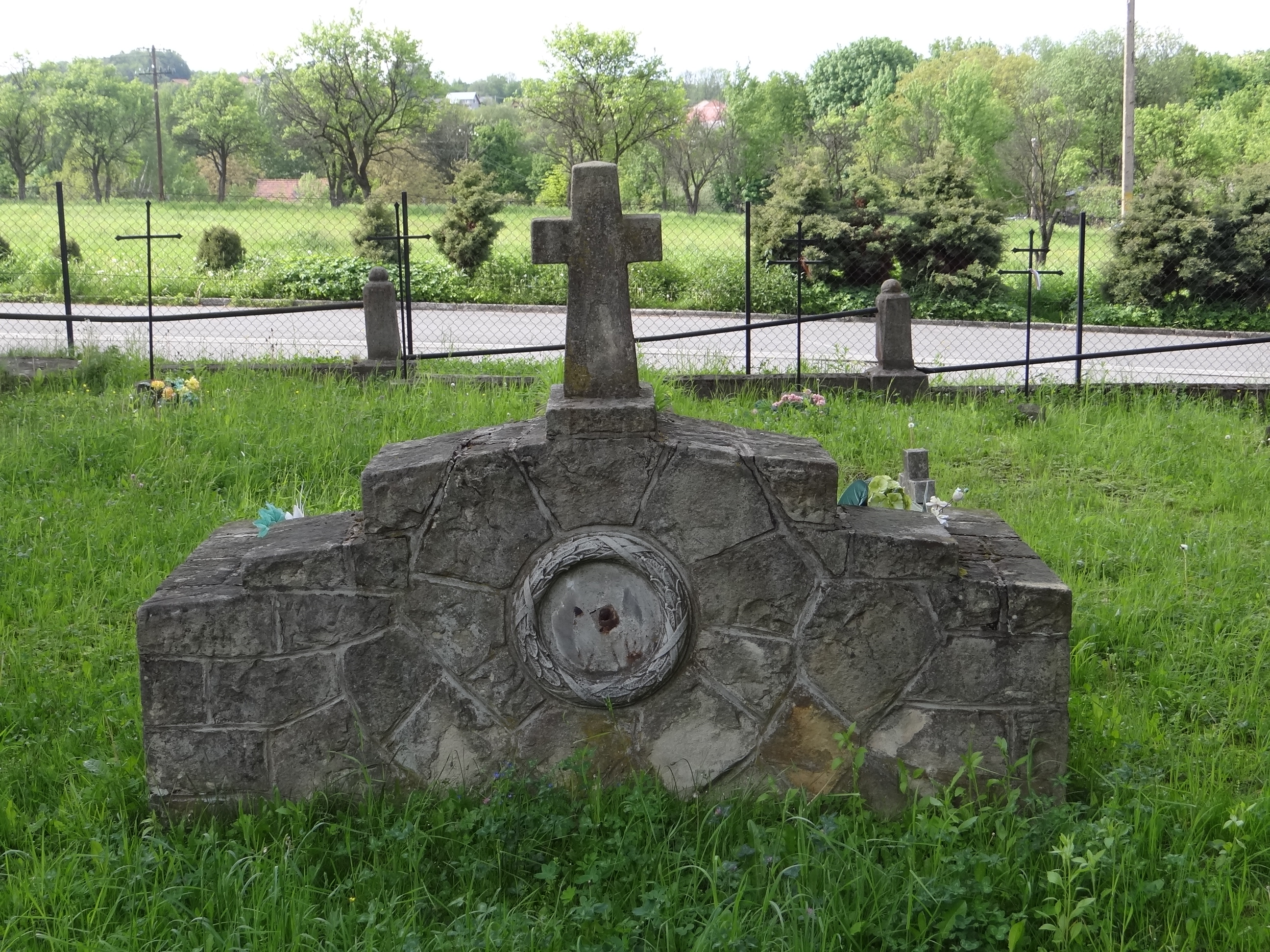 World War I Cemeteries nr 311 in Nowy Wiśnicz (Cmentarz wojenny nr 311 Nowy Wiśnicz)